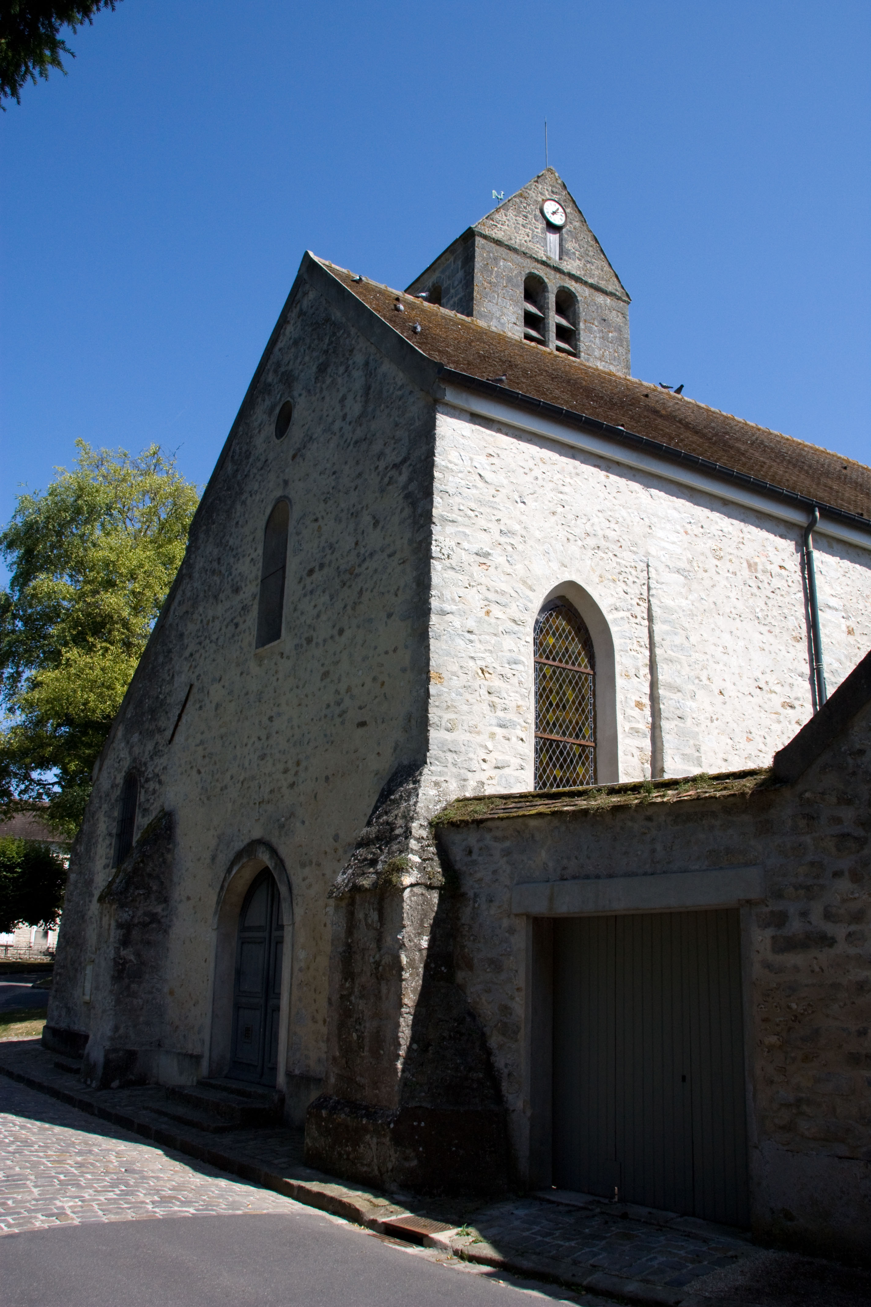 L'Eglise de Courances. Courances, Essonne, France